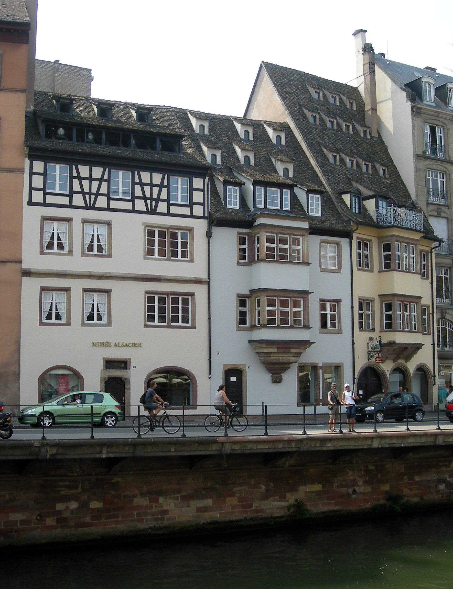 Au bord de l'Ill, le Musée alsacien de Strasbourg